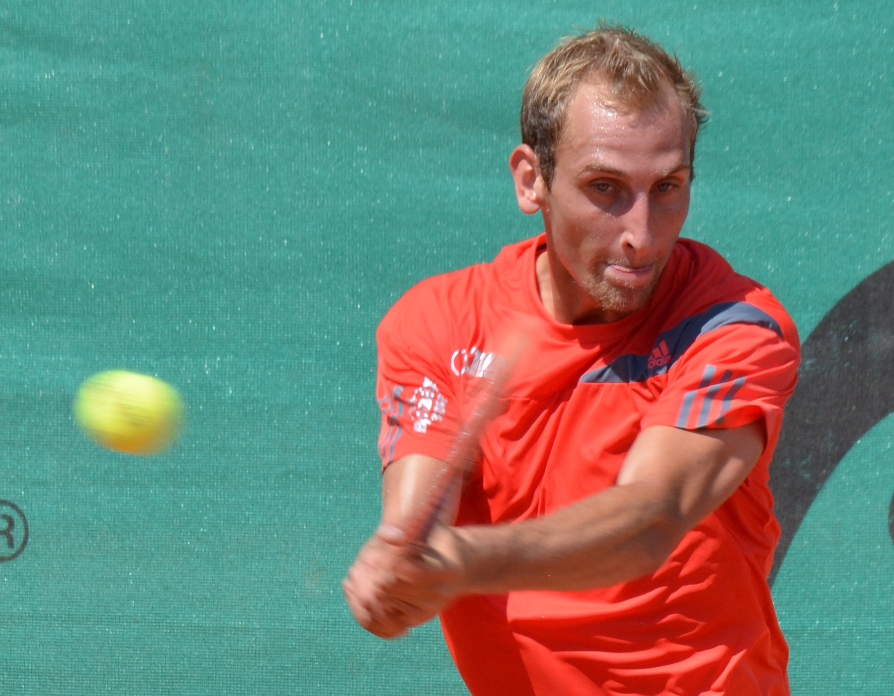 Thiemo de Bakker in der Begegnung gegen Lamine Ouahab in der 2. Bundesliga-Begegnung SC Uttenreuth gegen TV Reutlingen am 2. August 2015